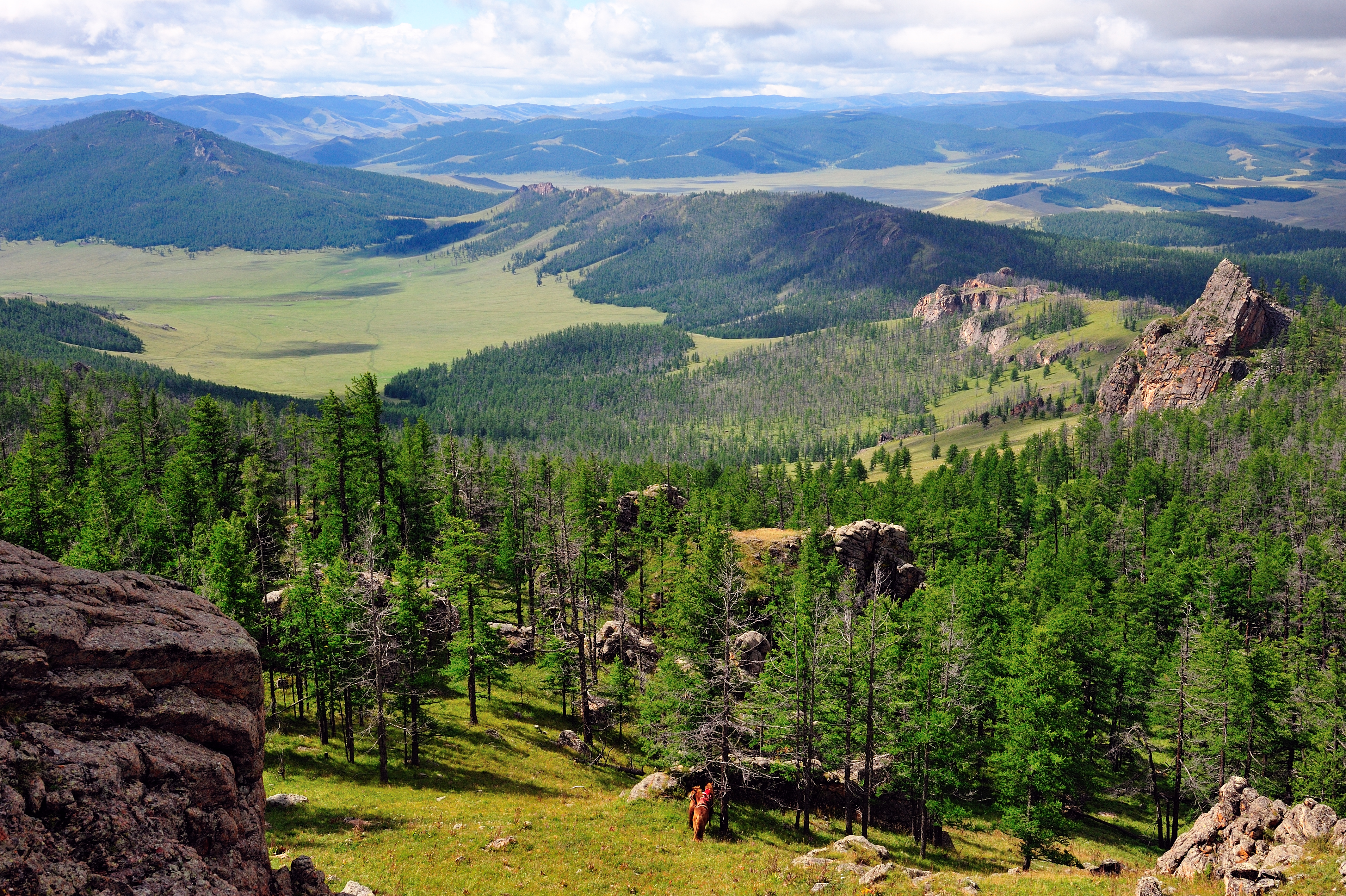 Монгол: Хавтгай булгийн эх. Зүүнхөхий. Дооно уул.